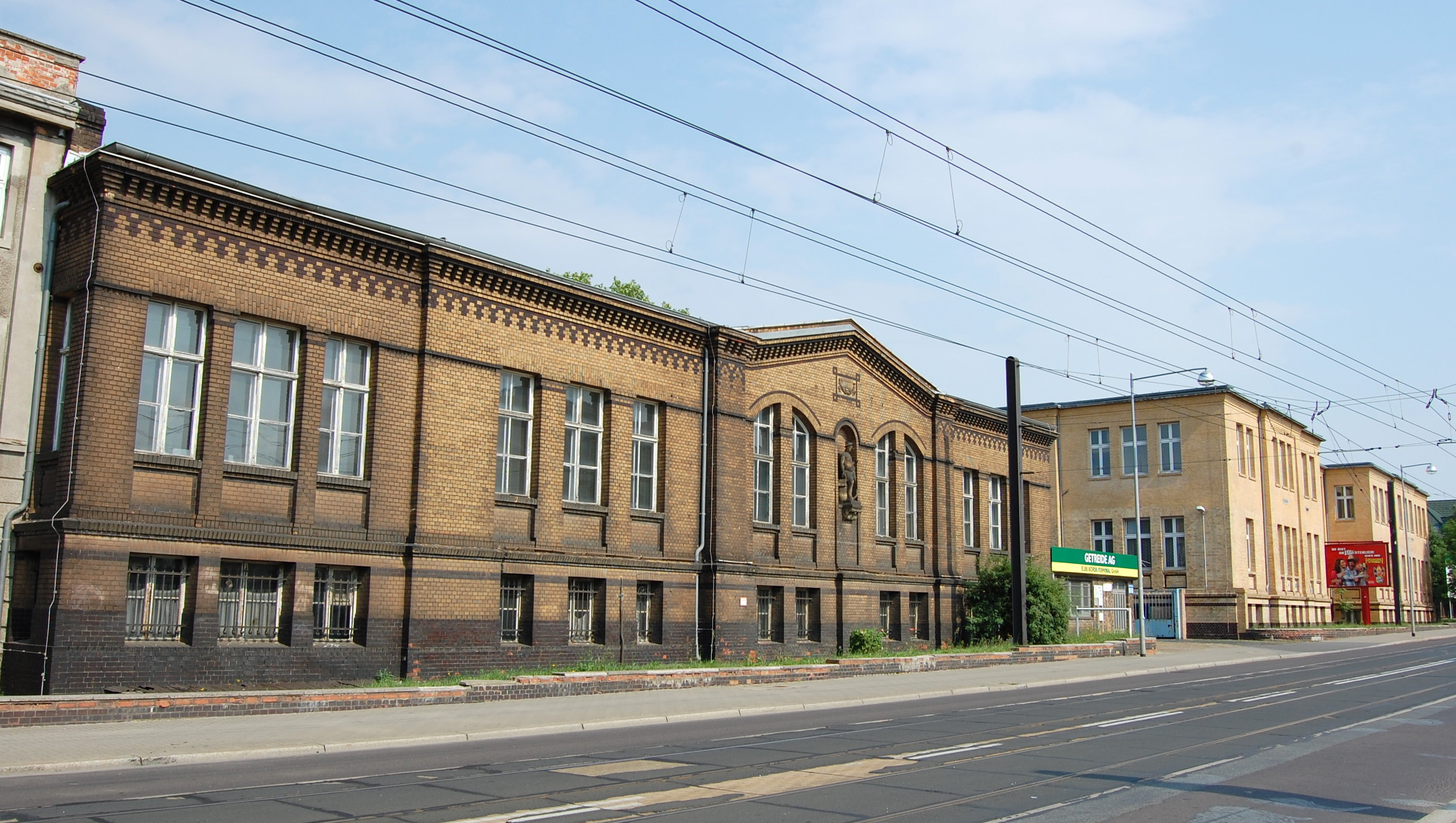 Haupteingang zum ehemaligen Werksgelände von Fahlberg-List in Salbke